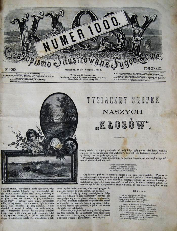 "Kłosy" 1884, nr 1000